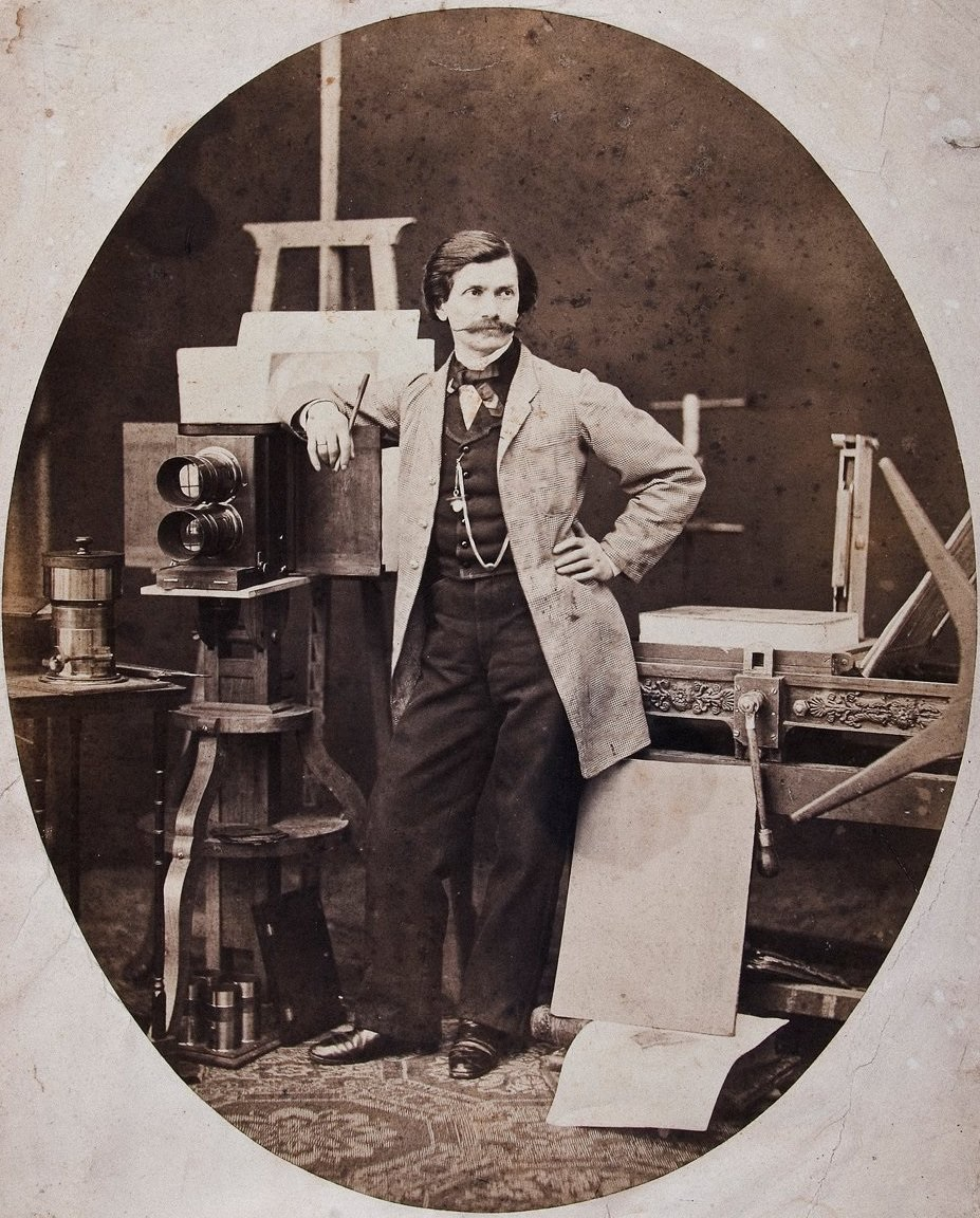 Autoportret w pracowni